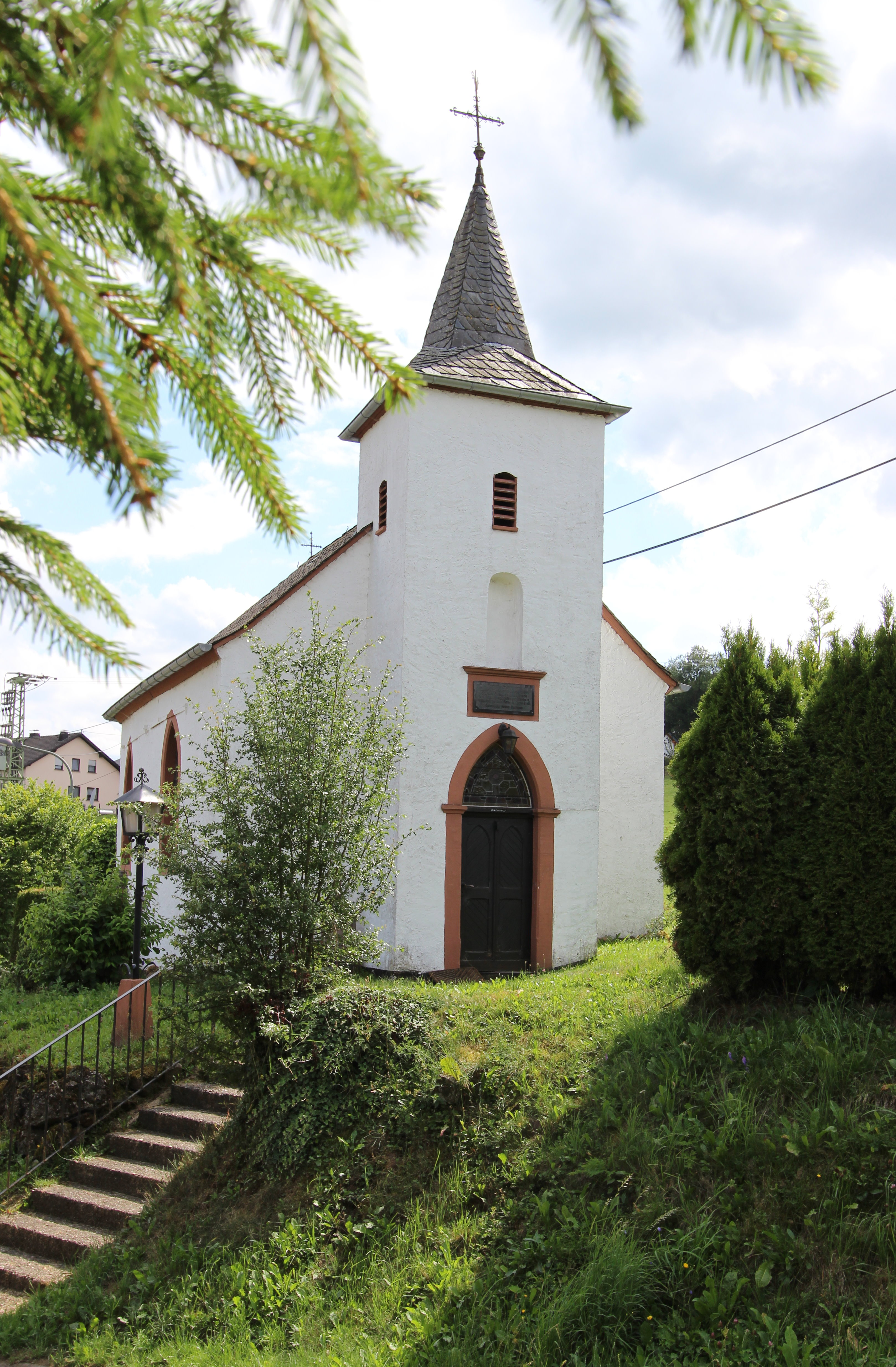 54597 Auw bei Prüm. Laudesfeld, bei Nr. 20. Nachbarocker Saalbau, 1859–61. Aufnahme von 2017.